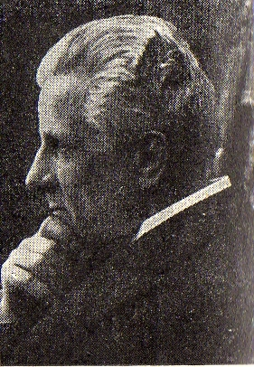 Suomalainen näyttelijä ja teatterinjohtaja Adolf Lindfors (1857-1929).